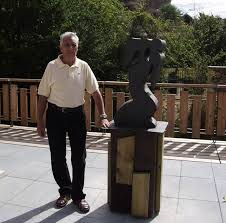 obra escultorica en Mudá